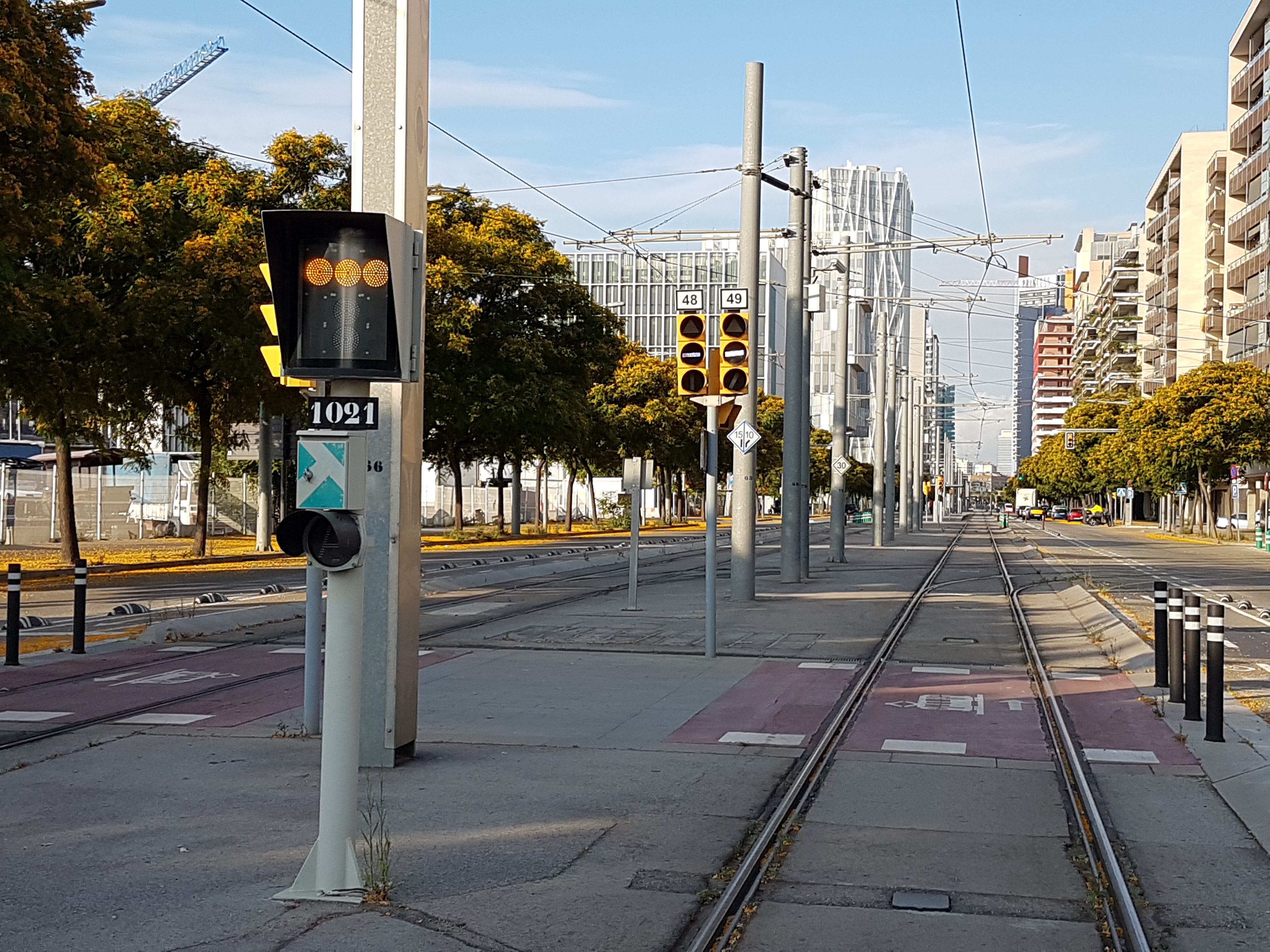 Senyalització tramviària entre Port Fórum i Campus Diagonal - Besòs